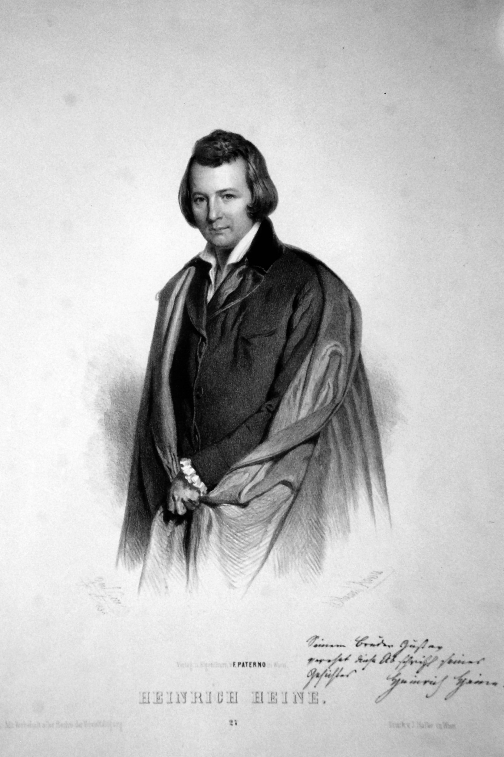 Heinrich Heine (1787-1856), deutscher Dichter und Schriftsteller. Lithographie von Eduard Kaiser, 1838